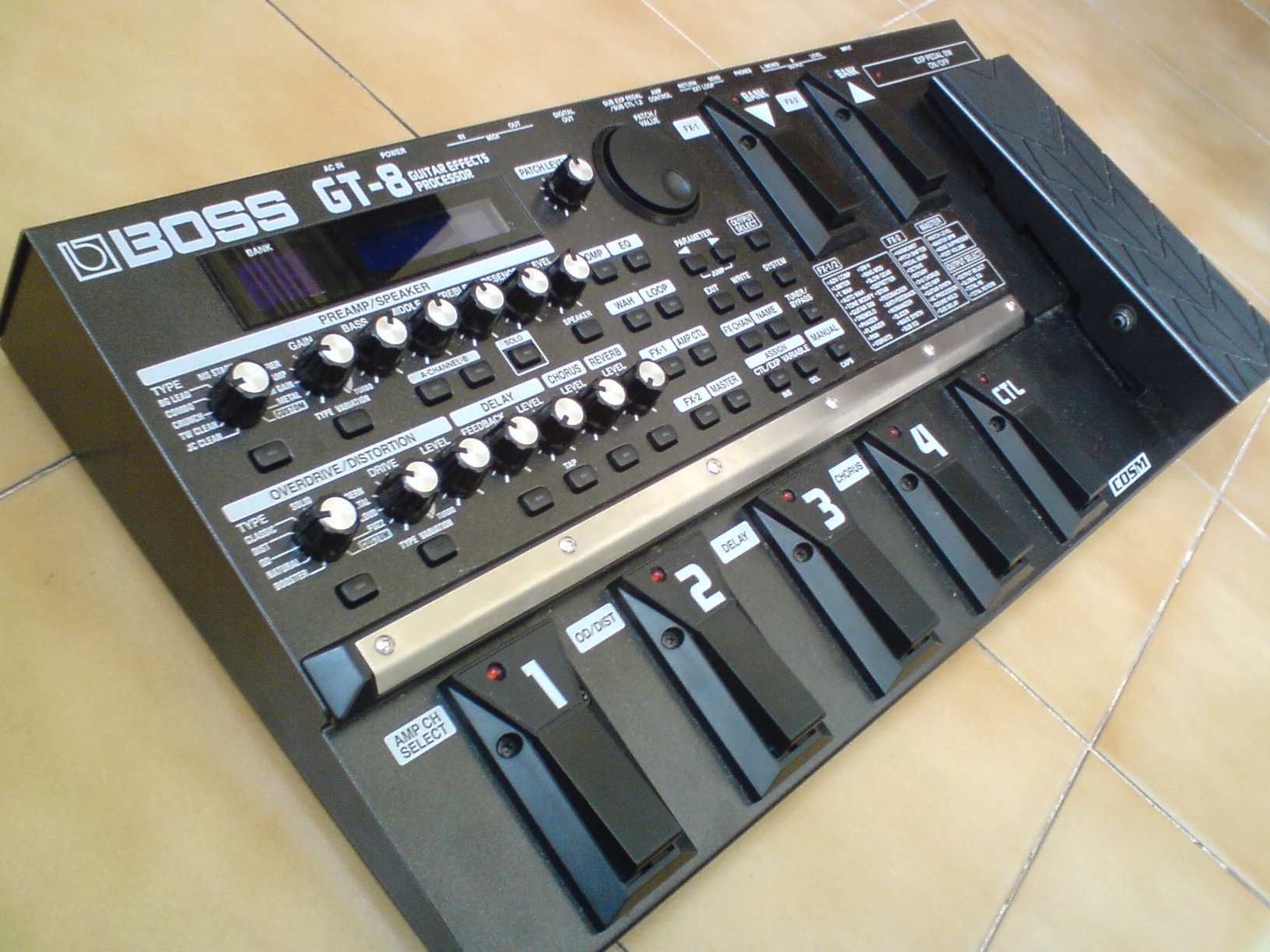 Boss GT-8 guitar multi-effects processor, pedaleira